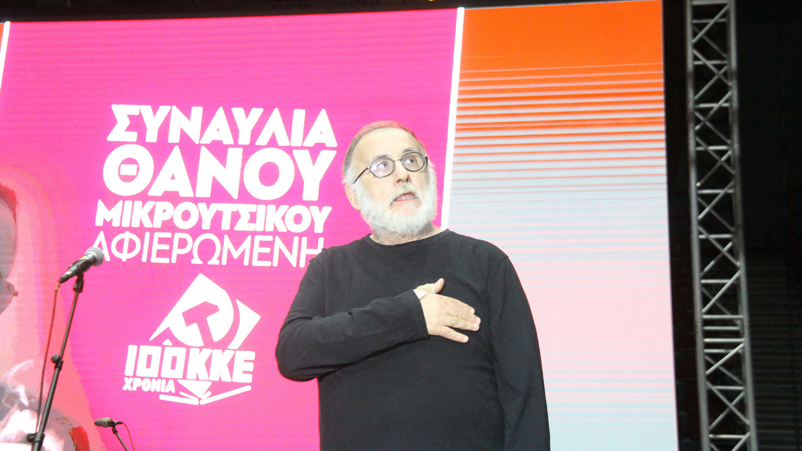 Ο Θάνος Μικρούτσικος στη συναυλία για τα 100 χρόνια του ΚΚΕ στην Πάτρα